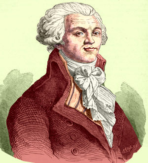 PD tekening van Engelse Wikipedia, ingekleurd naar bestaande schilderijen.